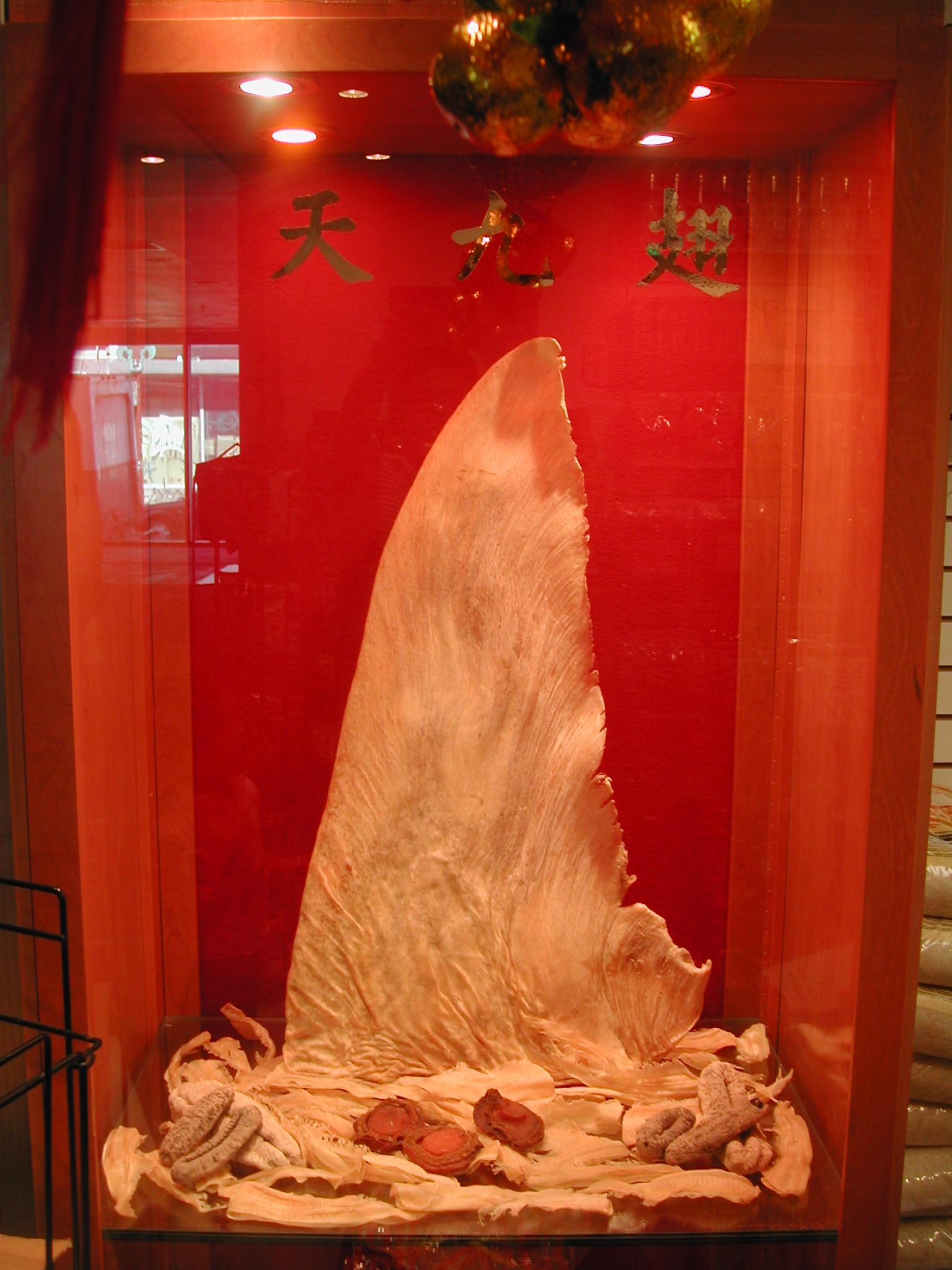 中式食品材料"天九翅"，是一種很名貴的魚翅。